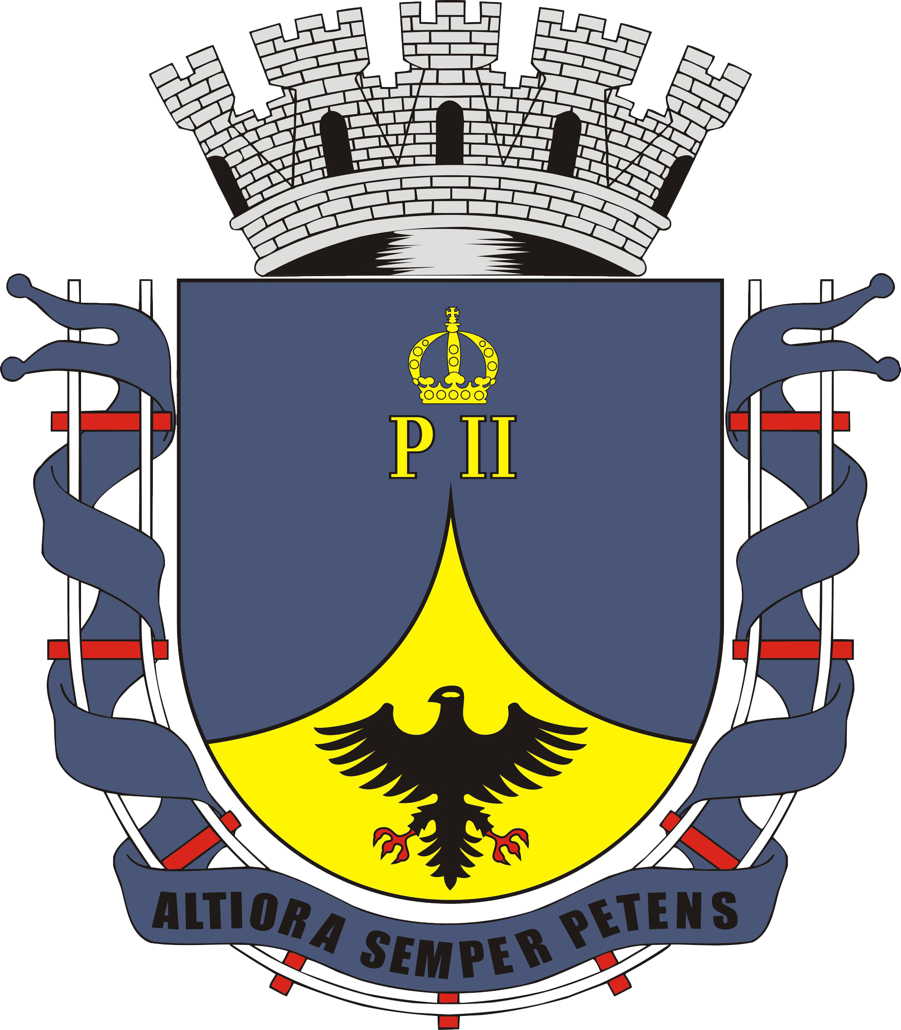 Brasão oficial do município de Petrópolis, no estado do Rio de Janeiro, criado pela deliberação nº 224 de 8 de janeiro de 1929, oficialmente parte do domínio público no Brasil.